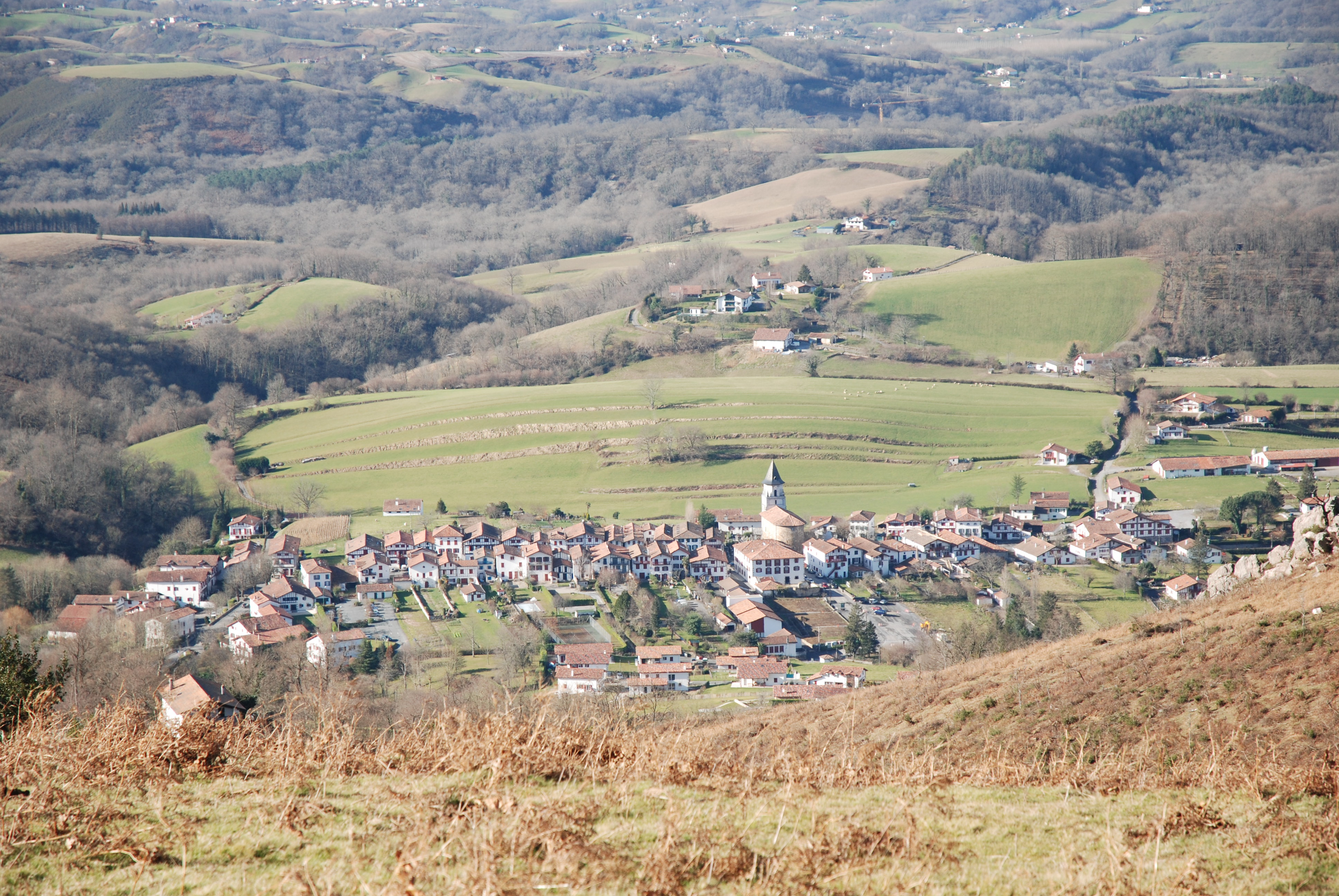 Ainhoa, vue du calvaire.